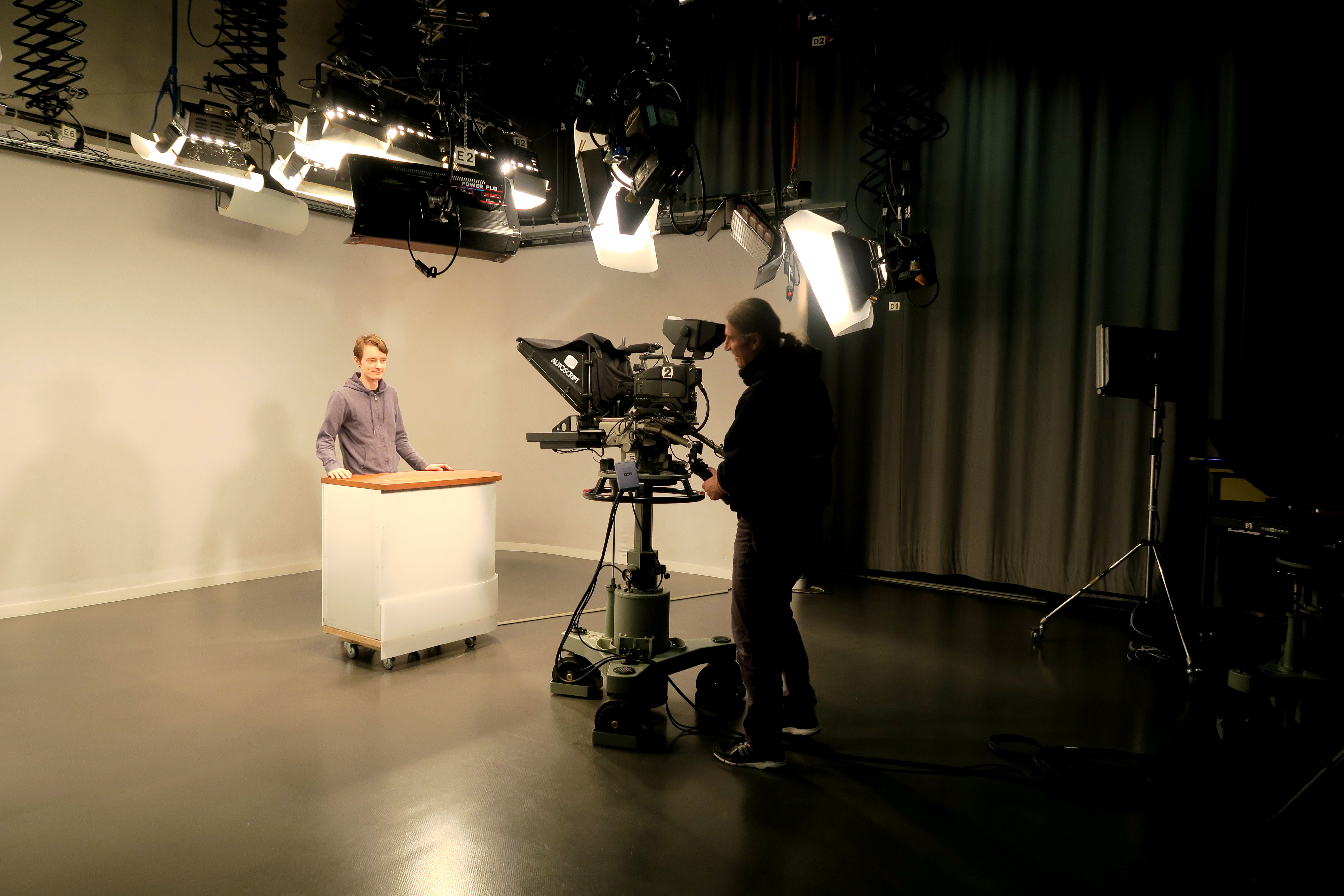 Fernsehstudio des Instituts zur Förderung publizistischen Nachwuchses (IFP) mit Wikipedianer XanonymusX am Interviewpult